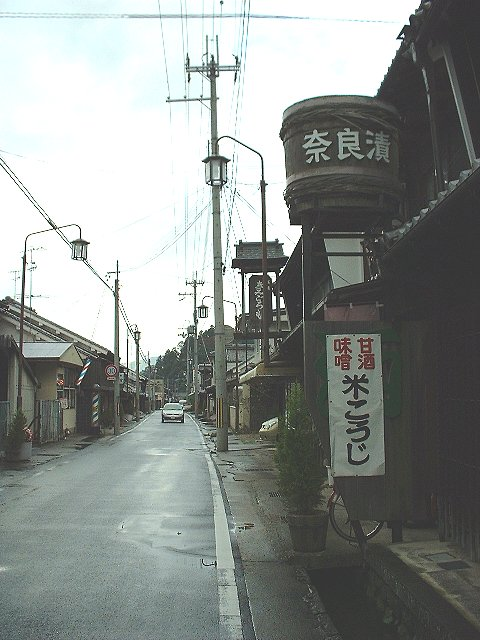 奈良県宇陀郡大宇陀町中心部の町並（現・宇陀市）